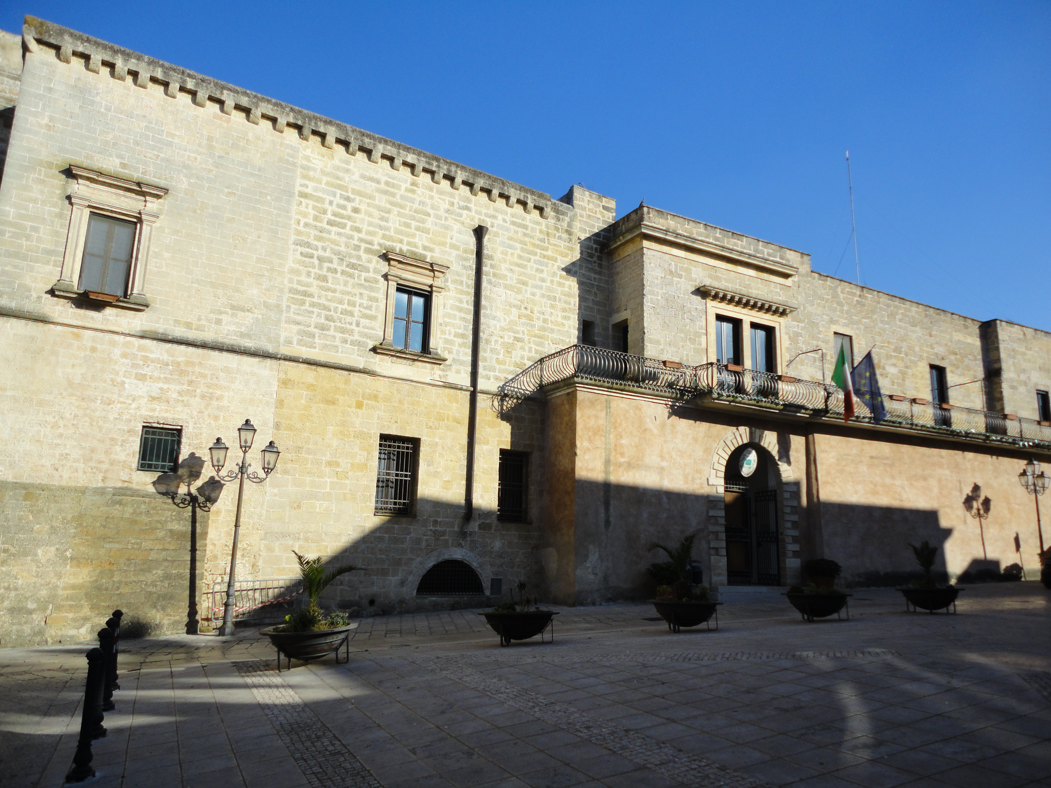 Castello di Supersano, Lecce